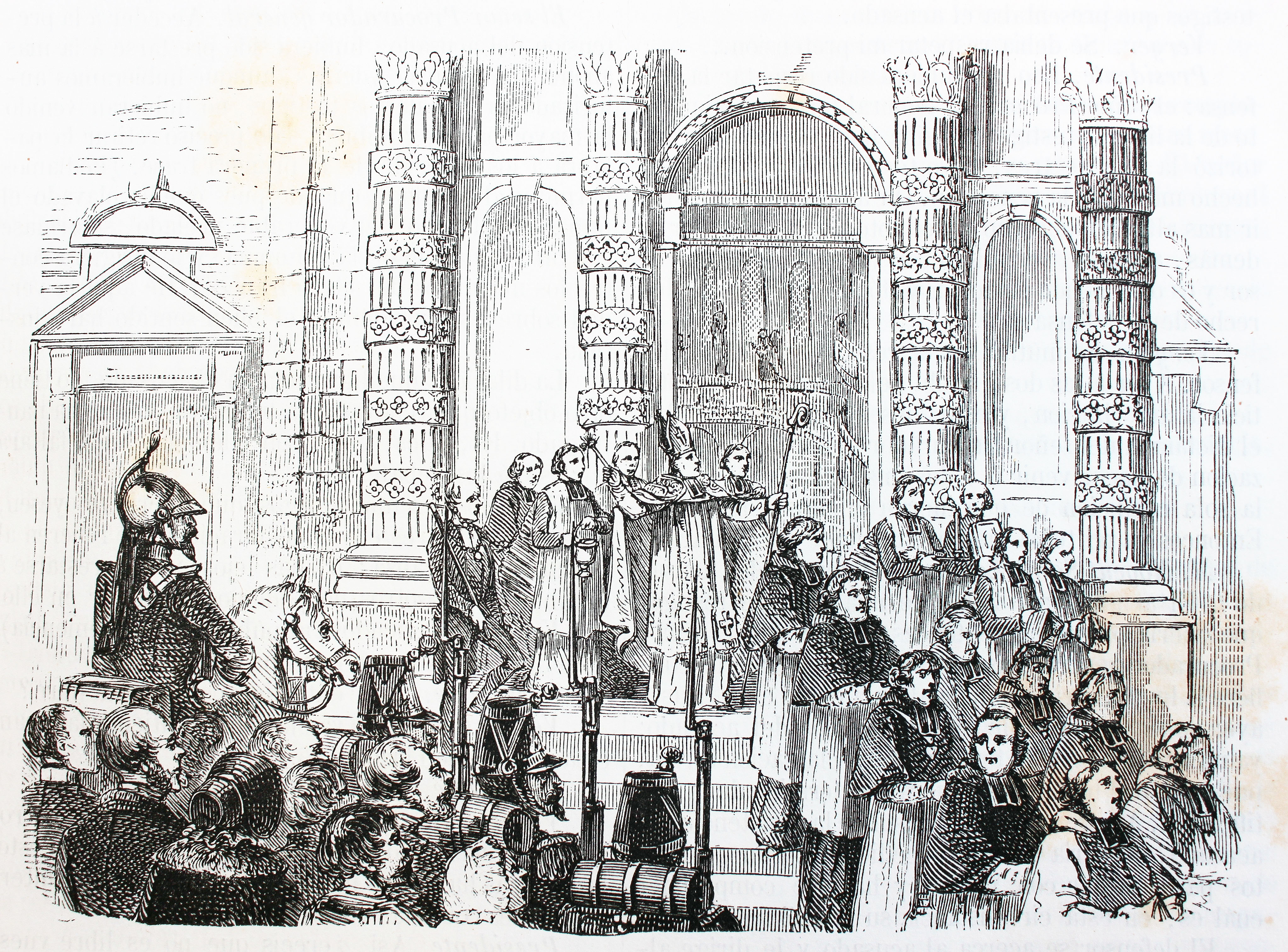 Ilustraciones de la obra : Anales dramáticos del crimen ó Causas célebres españolas y estranjeras [sic] / estractadas [sic] de los originales y traducidas, bajo la dirección de José de Vicente y Caravantes. - Madrid : Imprenta de Fernando Gaspar [etc.], 1858-1866. - Ed. il. con grabados...